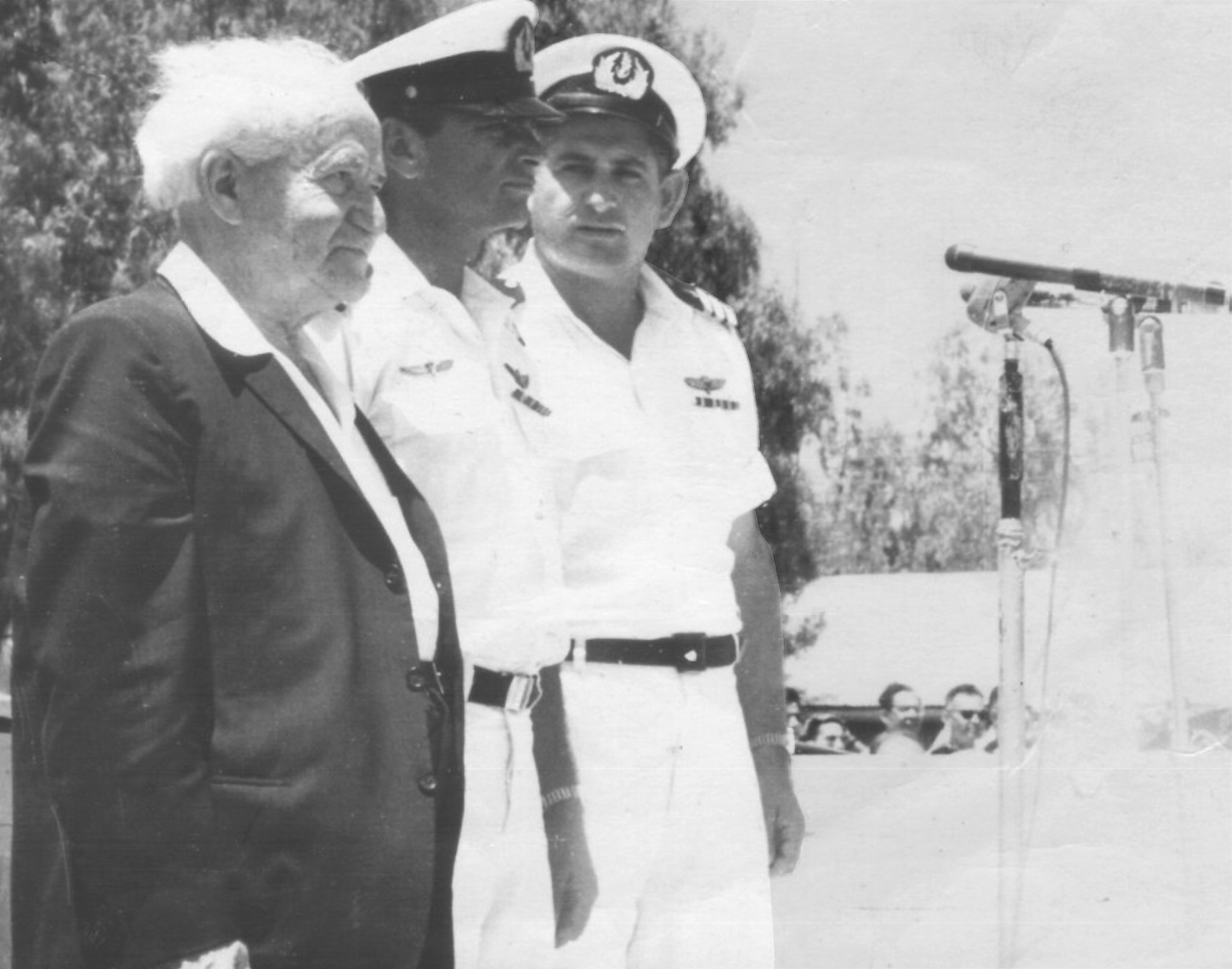 עם ב-ג